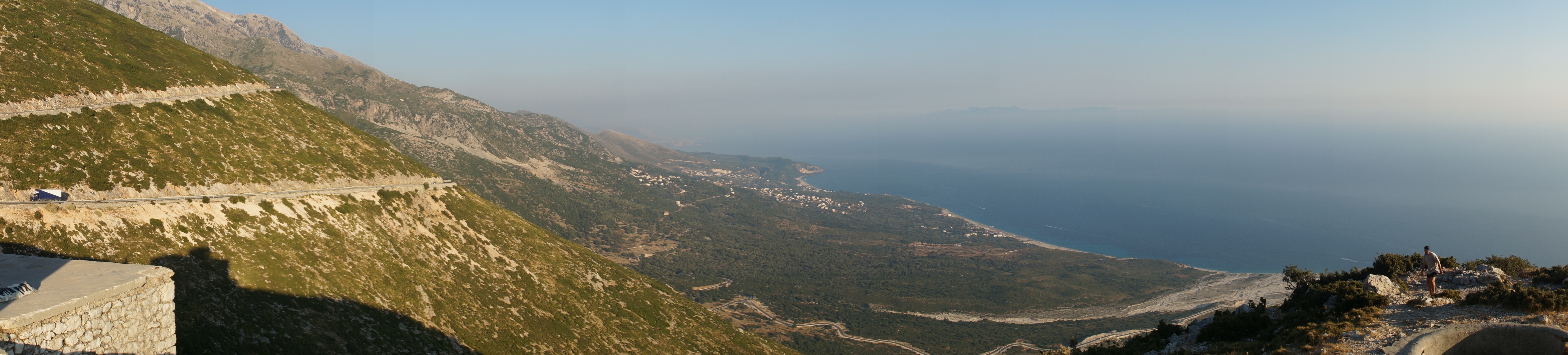 Albanian Riviera